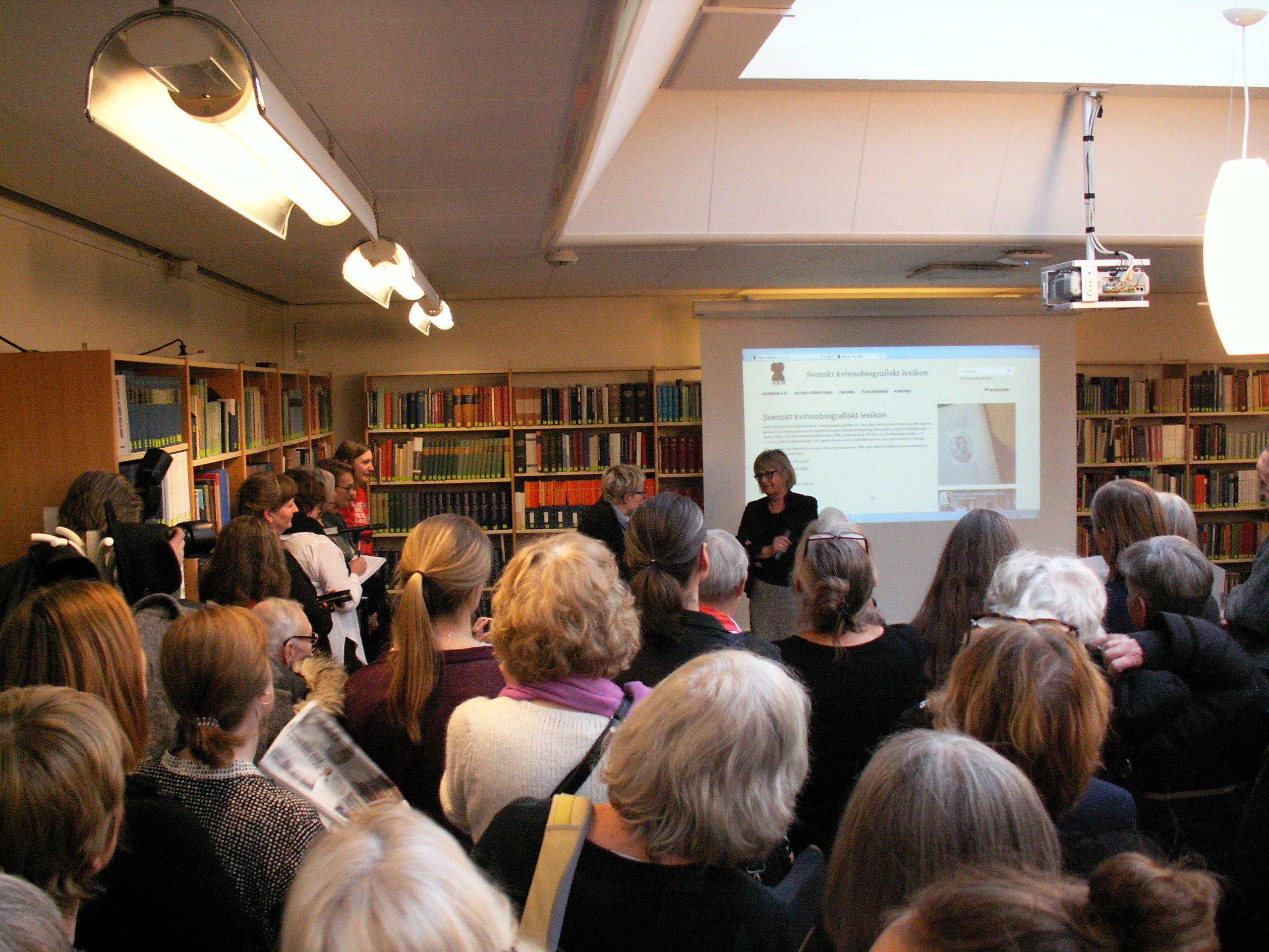 Svenskt kvinnobiografiskt lexikon, presentation (PICT1117), Humanistiska biblioteket i Göteborg.